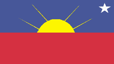 Bandera del municipio Macanao, isla de Margarita, estado Nueva Esparta, Venezuela